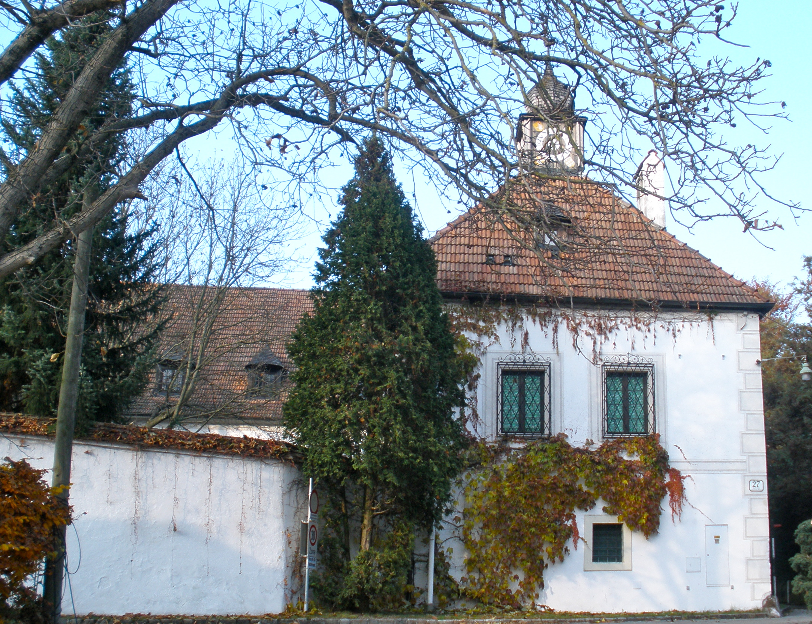 Bereits 1446 wird der "Sitz am Weyr" als ein zur Herrschaft Ort gehörendes Ritterlehen genannt. 1596 wurde es zur Gänze neu gebaut und 1621 von Kaiser Ferdinand II. zum "Freien Edelmannsitz" erhoben. 1739 wurde das Anwesen durch den Besitzer Karl von Frey in eine Waisenhausstiftung umgewidmet, aufgrund dessen sich auch die in Gmunden zum Teil immer noch gebräuchliche Bezeichnung "Woaslhaus" ableitet. Im Schloss Weyer war mit der "K.K. Trivialschule" auch die erste Schule in Traundorf untergebracht. Sie wurde 1879 aufgelassen. Das Renaissanceschloss befindet sich heute in privatem Besitz und beherbergt eine Galerie, die vor allem Meissener Porzellan präsentiert